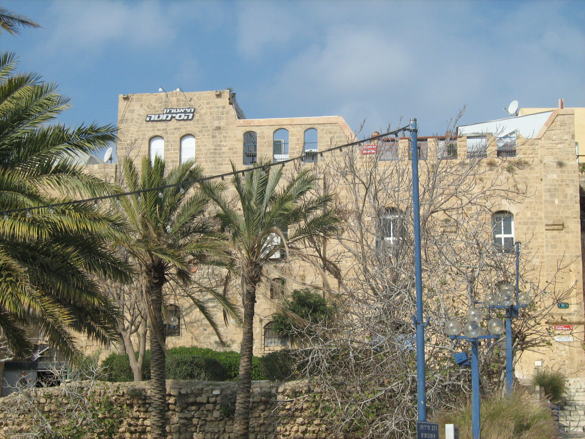 יפו